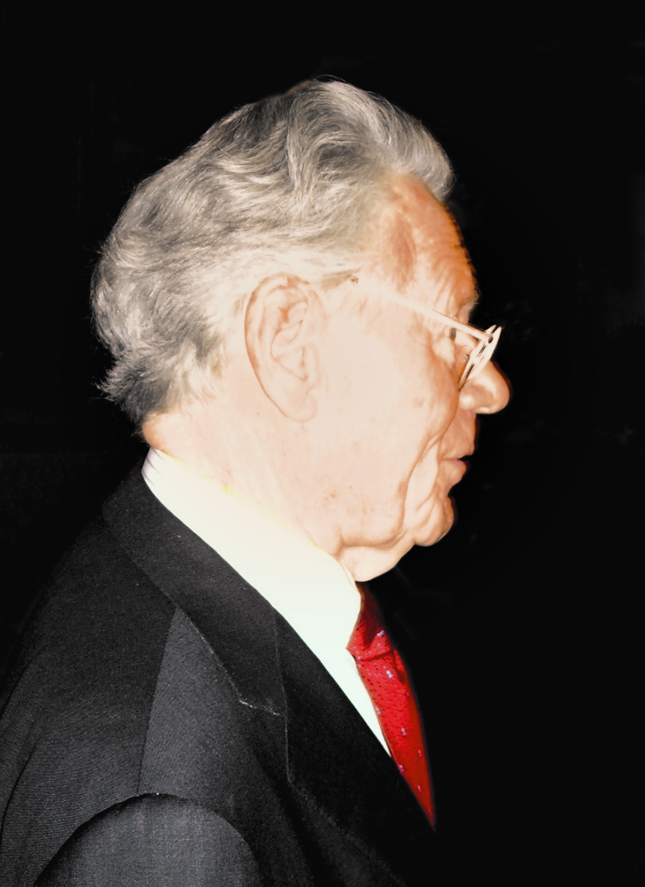 Hans Küng in der Synagoge (Hechingen) am 2. März 2009